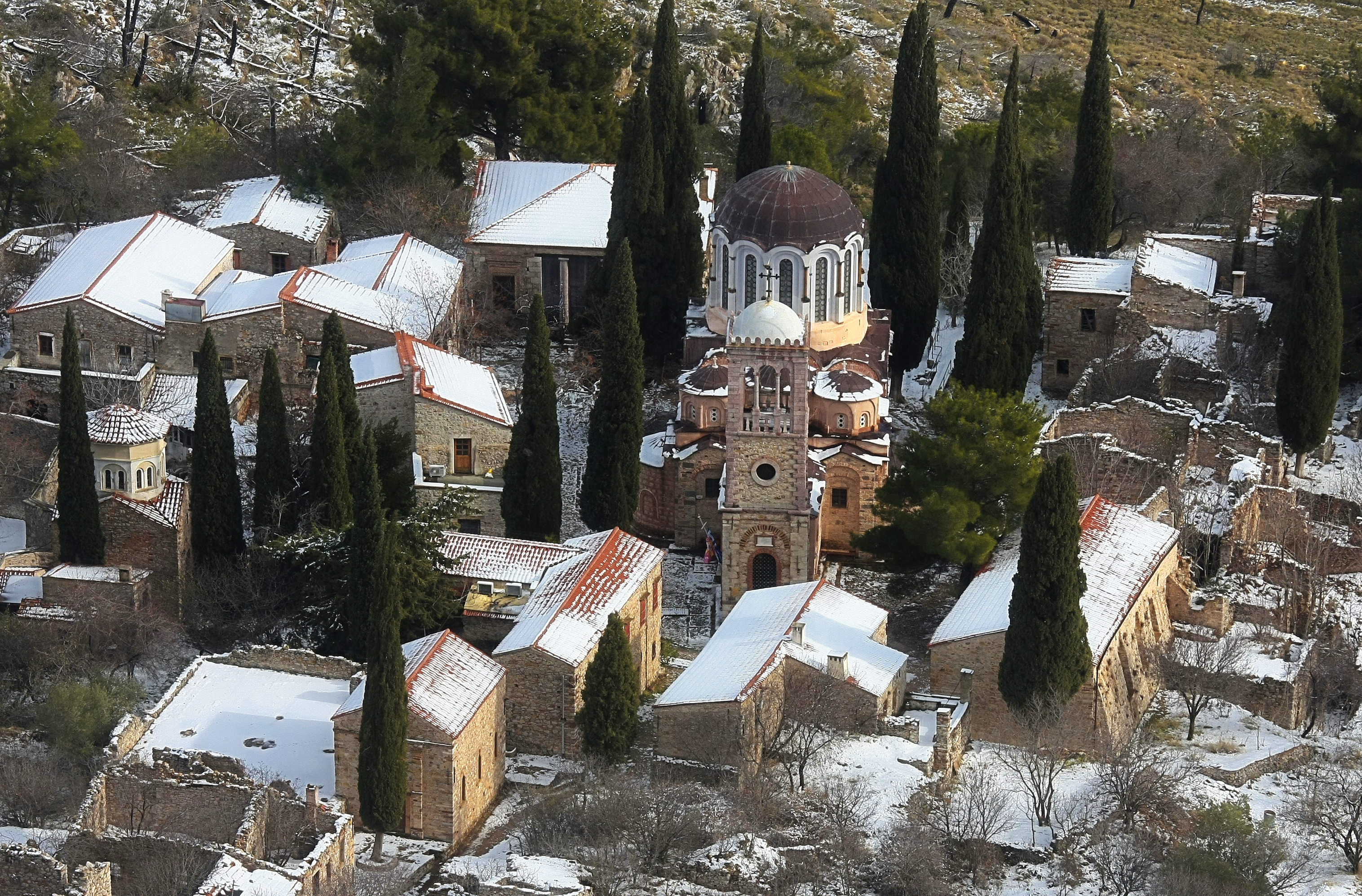 Νέα Μονή Χίου«Νέα Μονή Χίου»